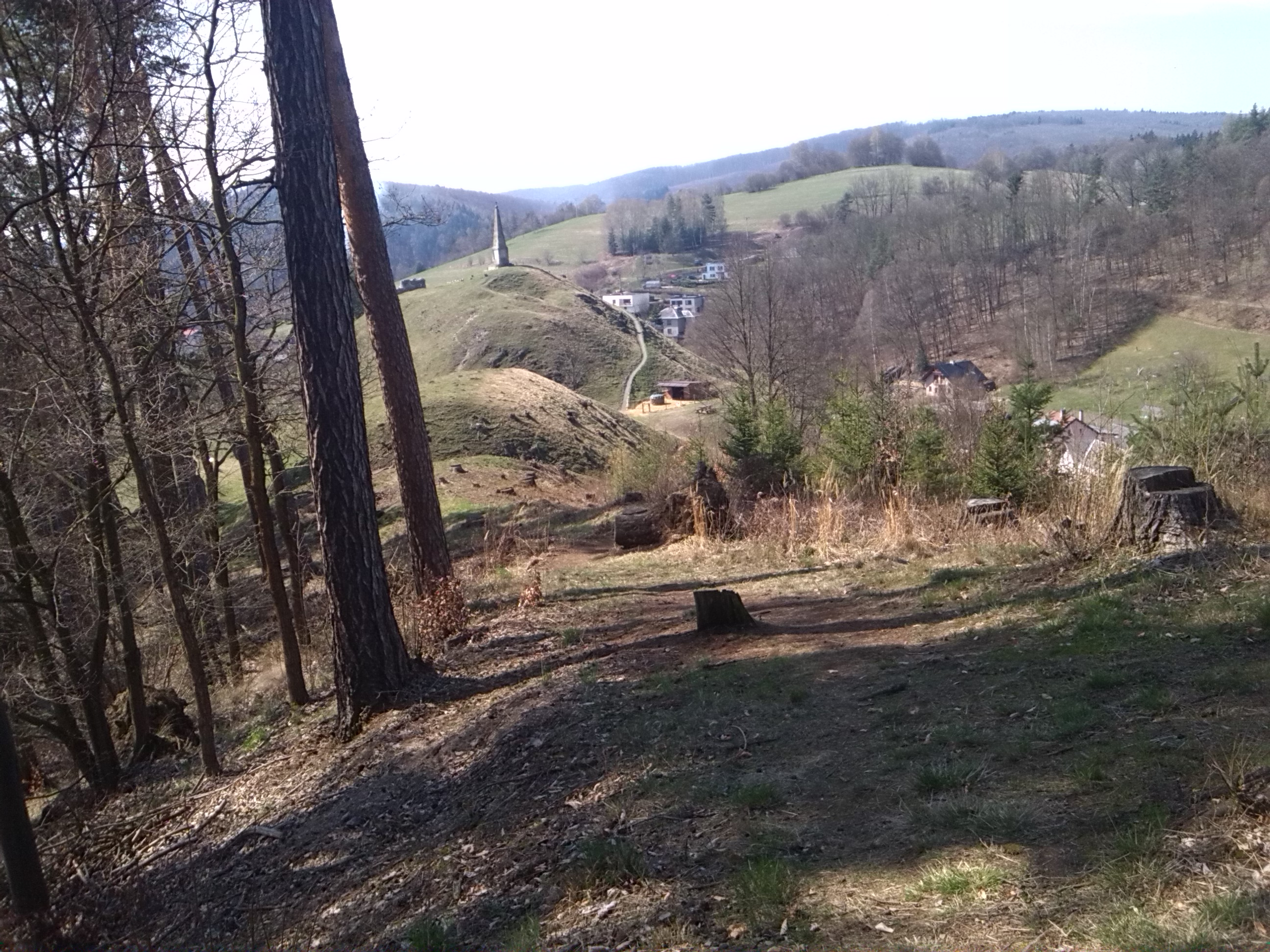 Hoštejn